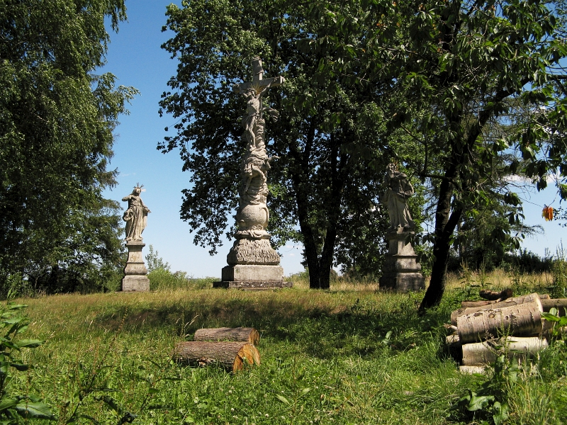 Sousoší Kalvárie, lesík u depa Širočany, Týn nad Vltavou